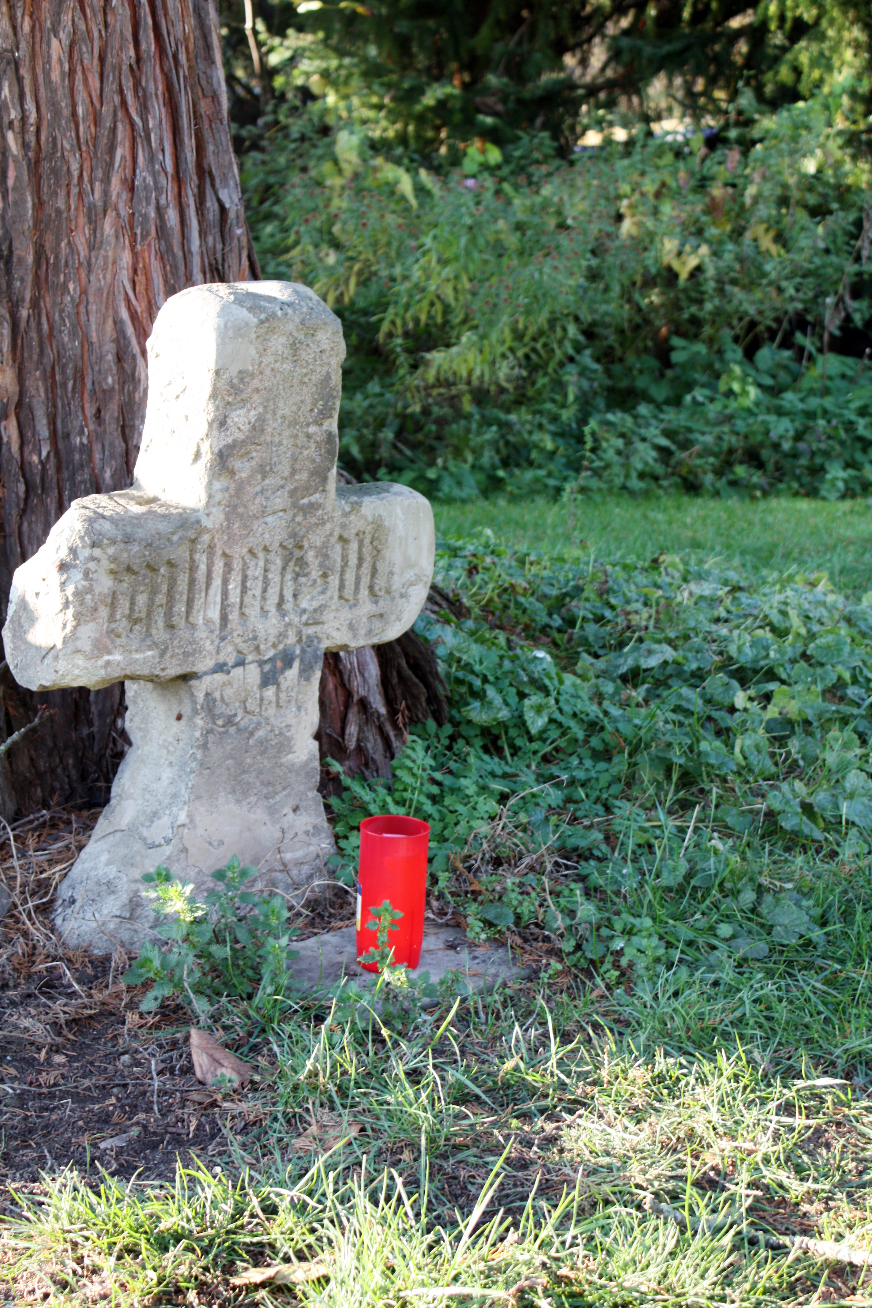 Hürth-Burbach, alter Grabstein auf dem Gelände des ehemaligen Klosters Marienborn